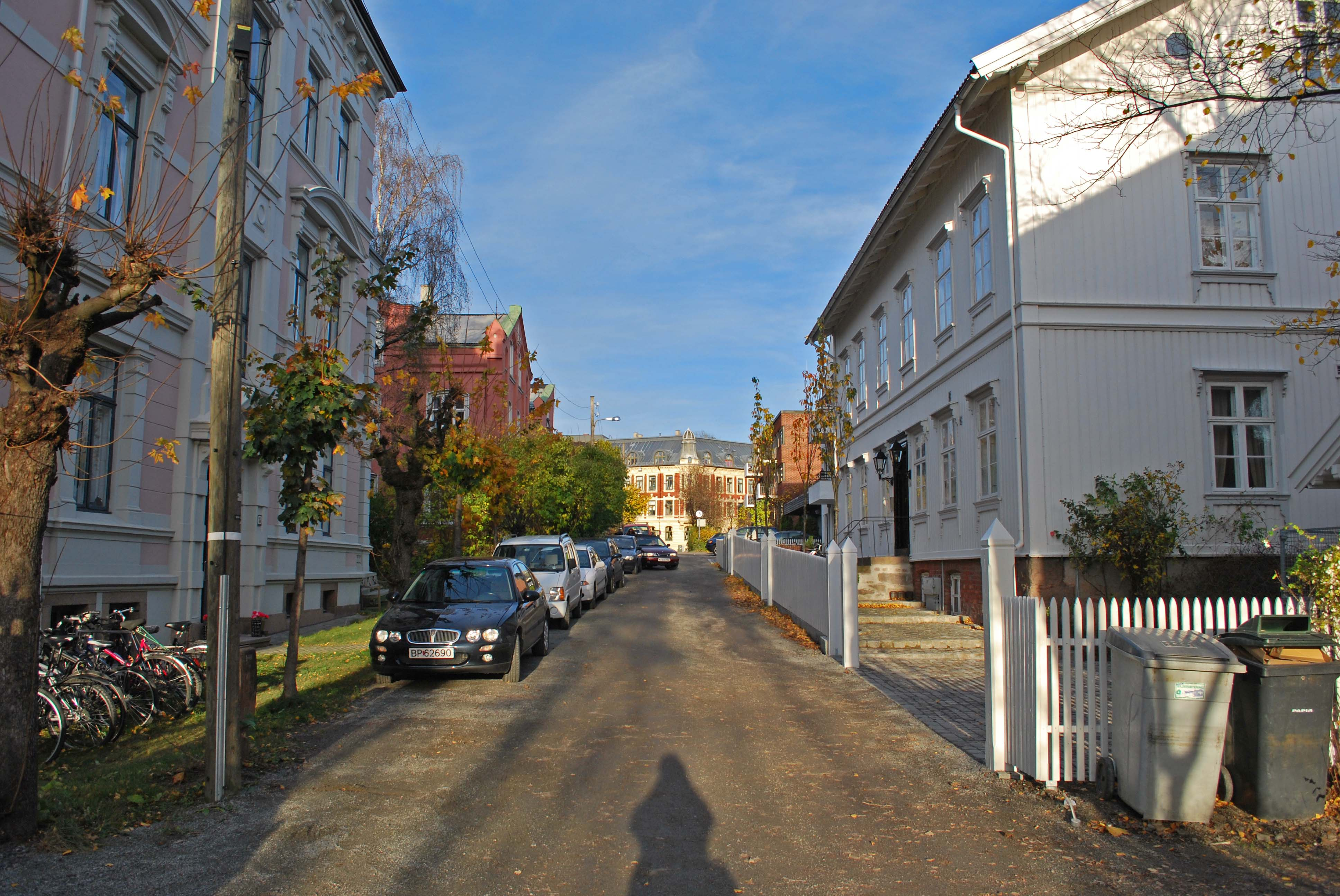 Daas gate sett mot professor Dahls gate, med nr 15A til høyre